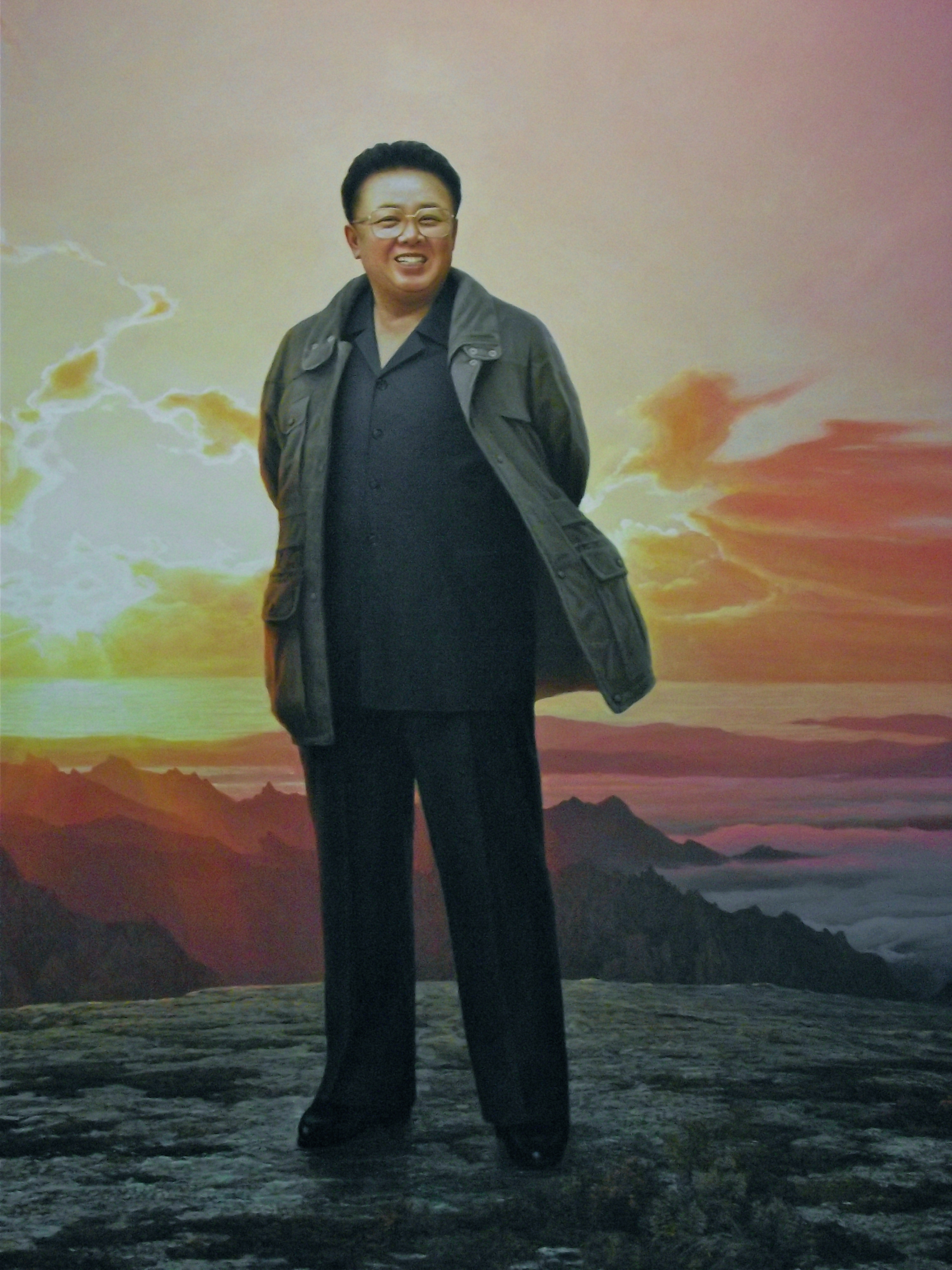 Kim Jong-il painting